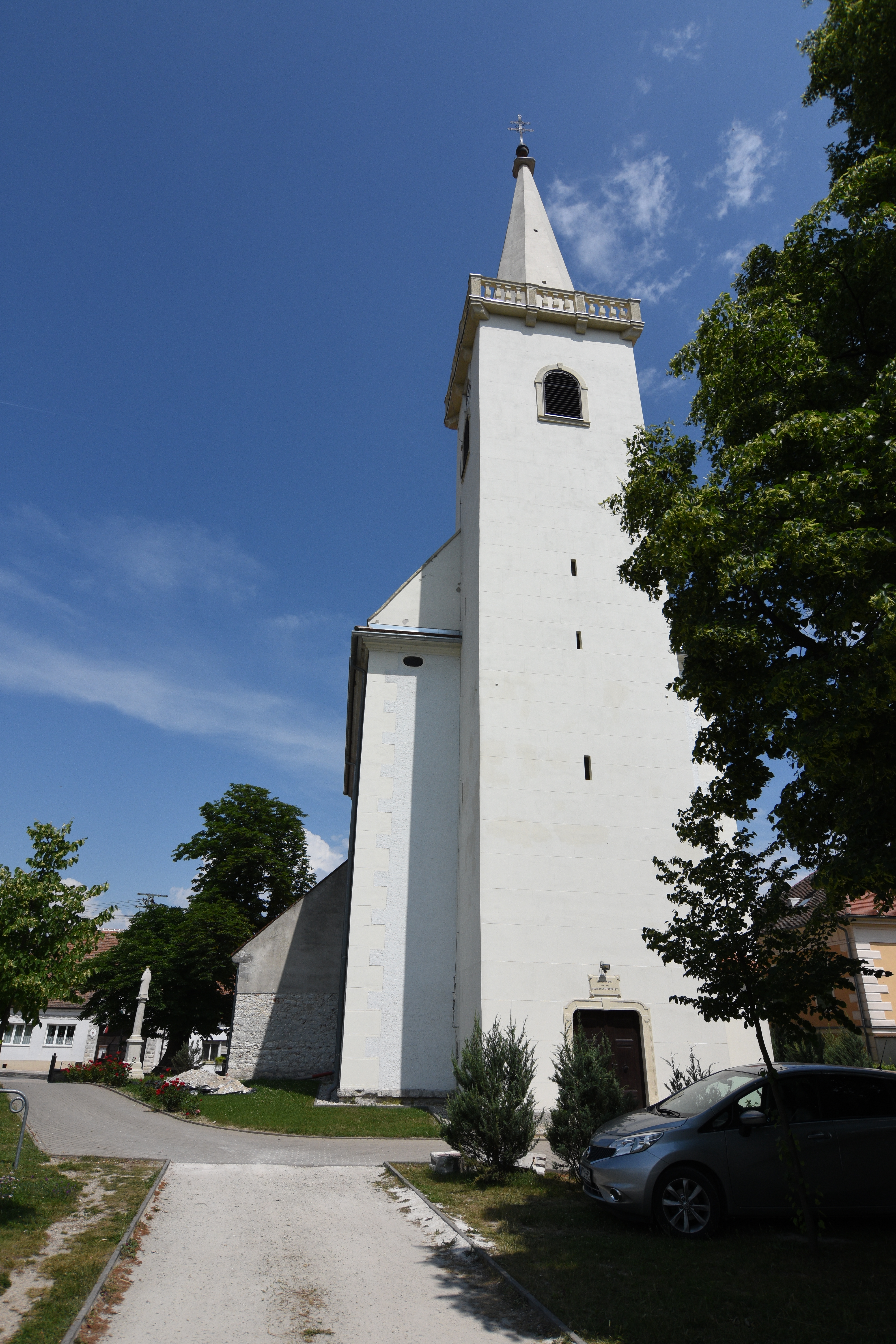 Urunk Mennybemenetele templom Fertőrákos